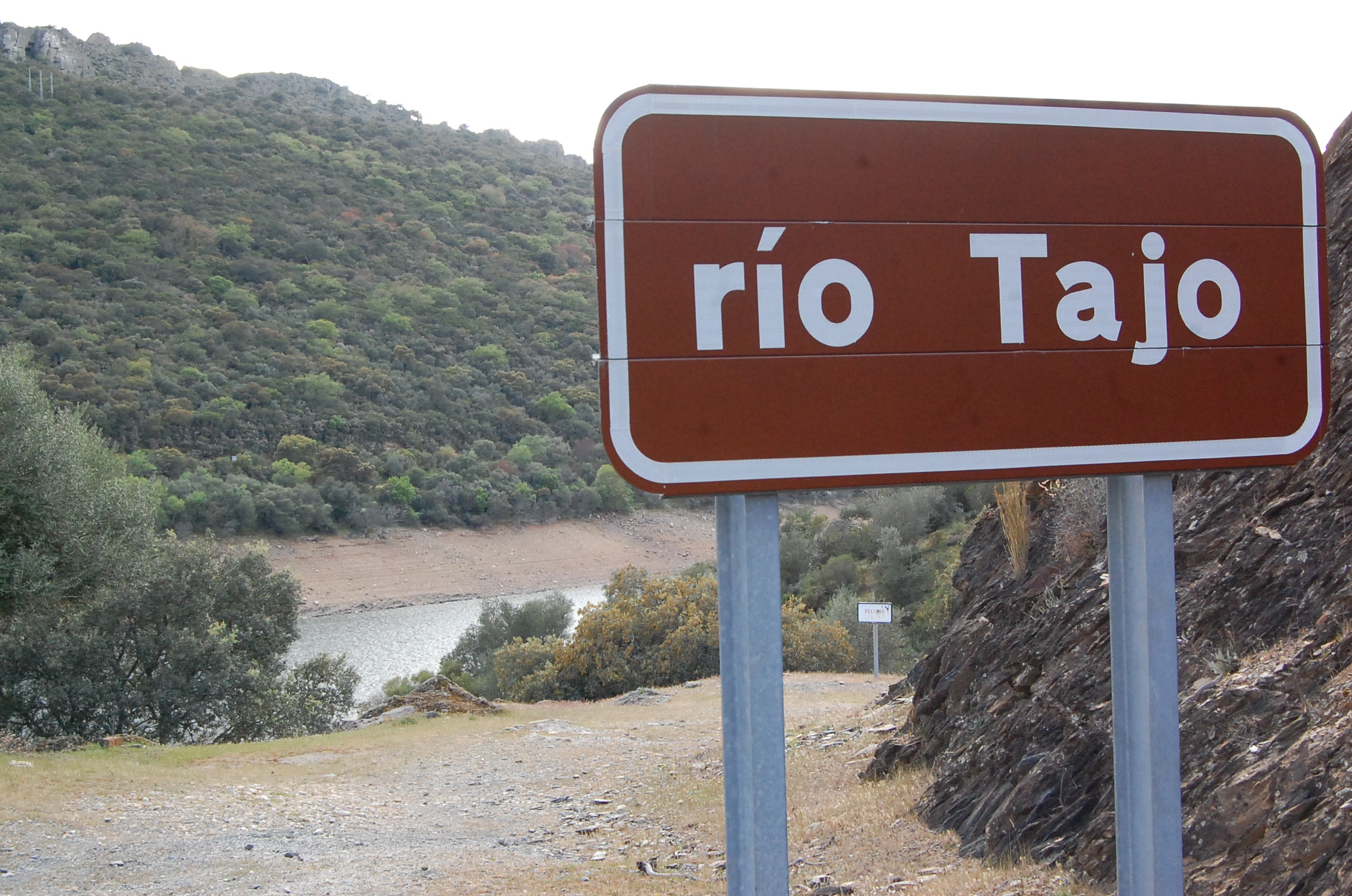 Walon: Aiwe di Taedje el Rezieve di Monfragouwé